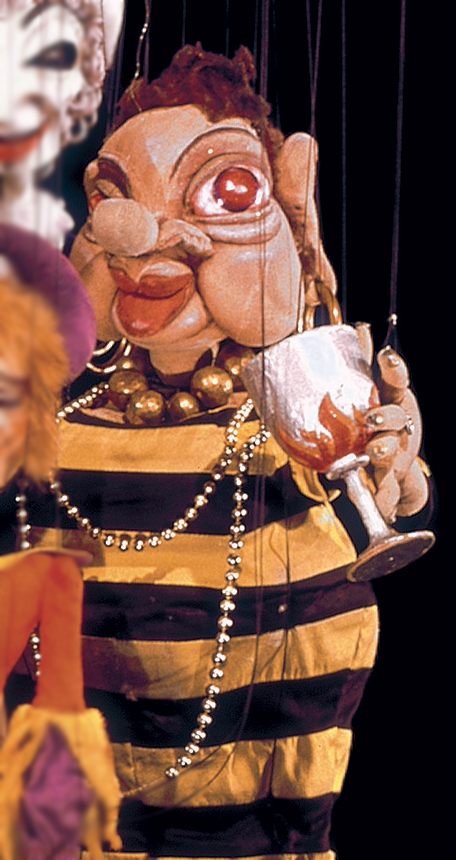 Tyrannja Vamperl, eine Figur aus dem Marionetten-Theaterstück Der satanarchäolügenialkohöllische Wunschpunsch nach dem Roman von Michael Ende (Düsseldorfer Marionetten-Theater)